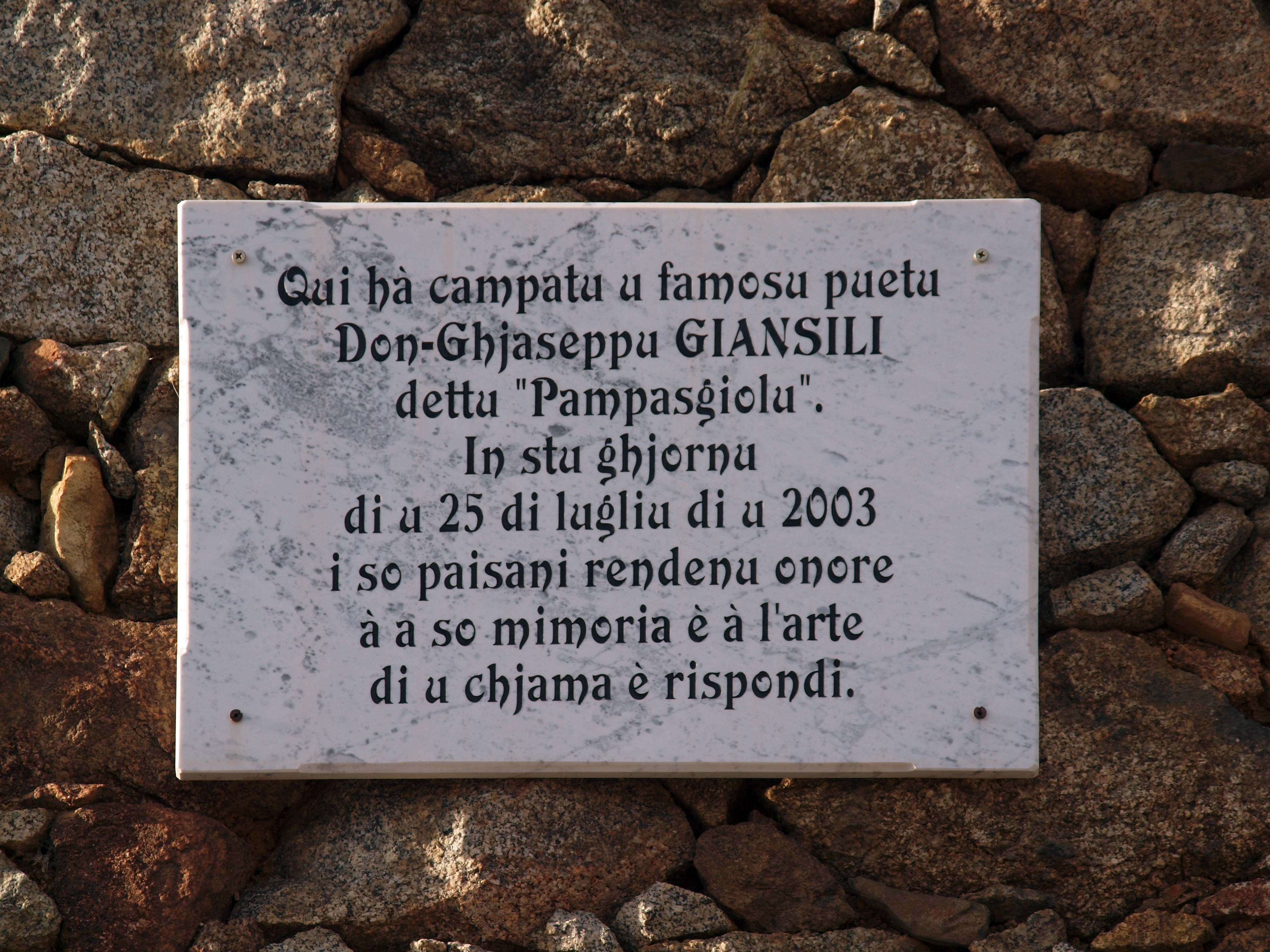 Lozzi, Niolu (Corse) - Plaque commémorative apposée sur le façade de la maison du poète Pampasgiolu à l'Acquale